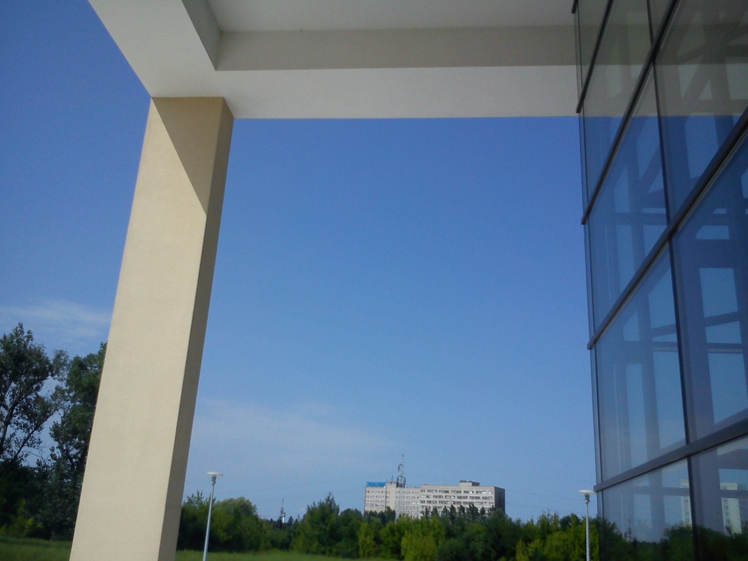 Biocentrum Uniwersytetu Przyrodniczego, Poznań, ul. Dojazd.